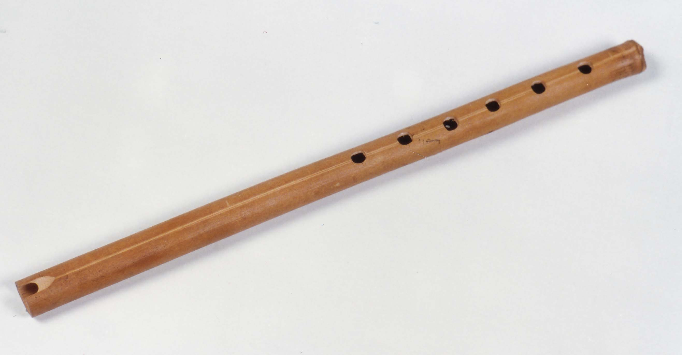 Quena, segle XX, MDMB 829, fons Museu de la Música de Barcelona